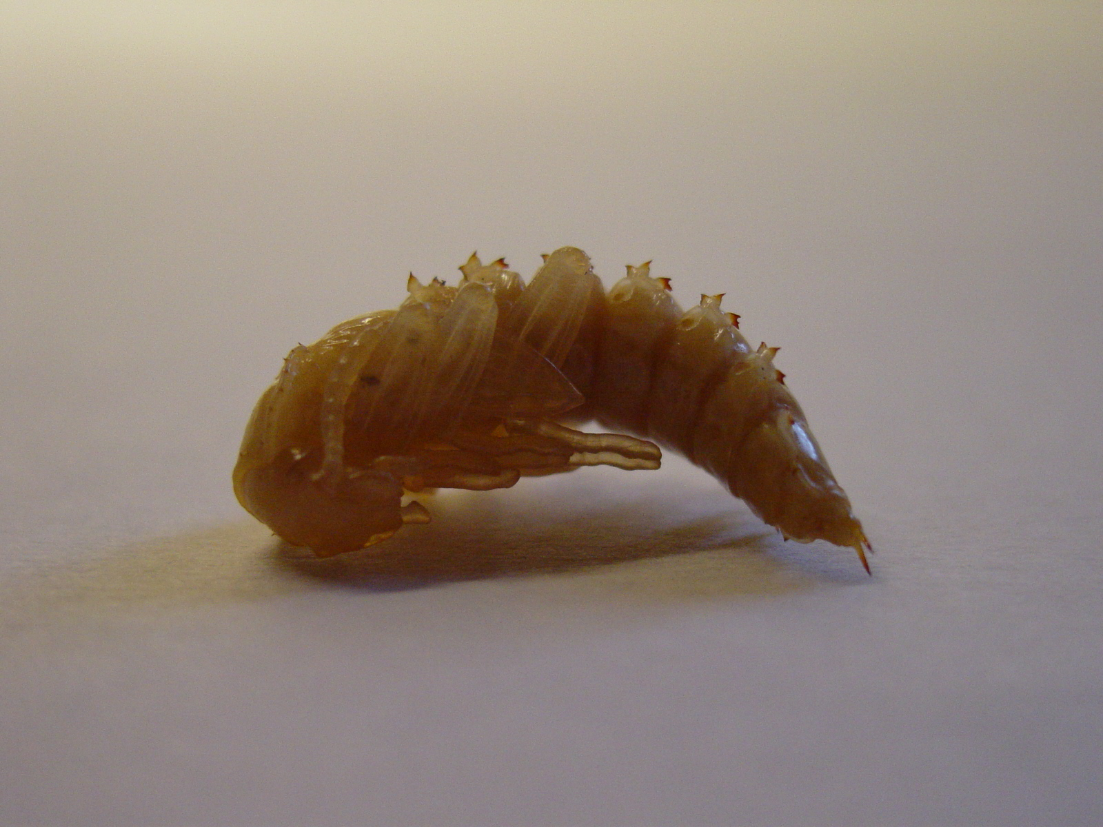 Een meeltorpop.